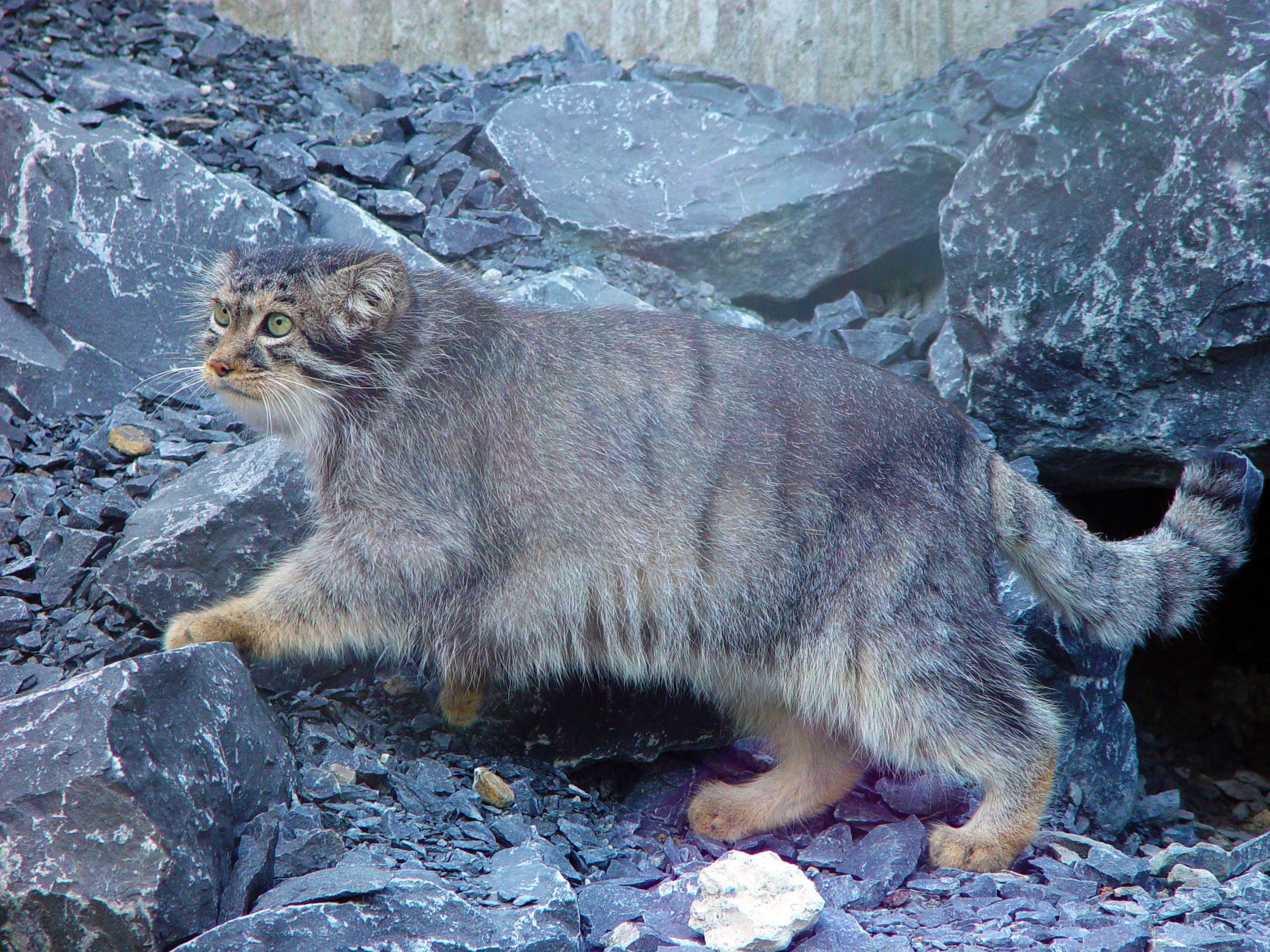 Manul (Otocolobus manul) in Zoo Zürich